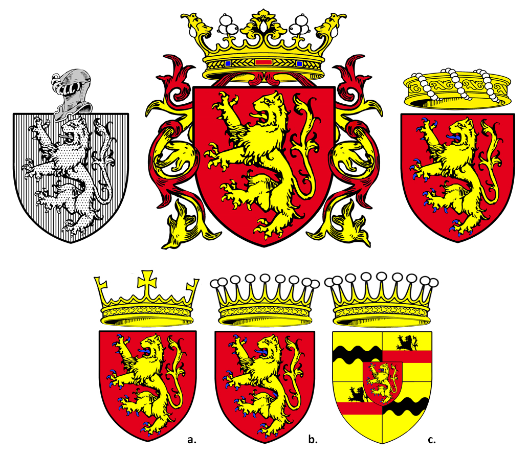 Diverses armes de la Maison de ROUGEMONT